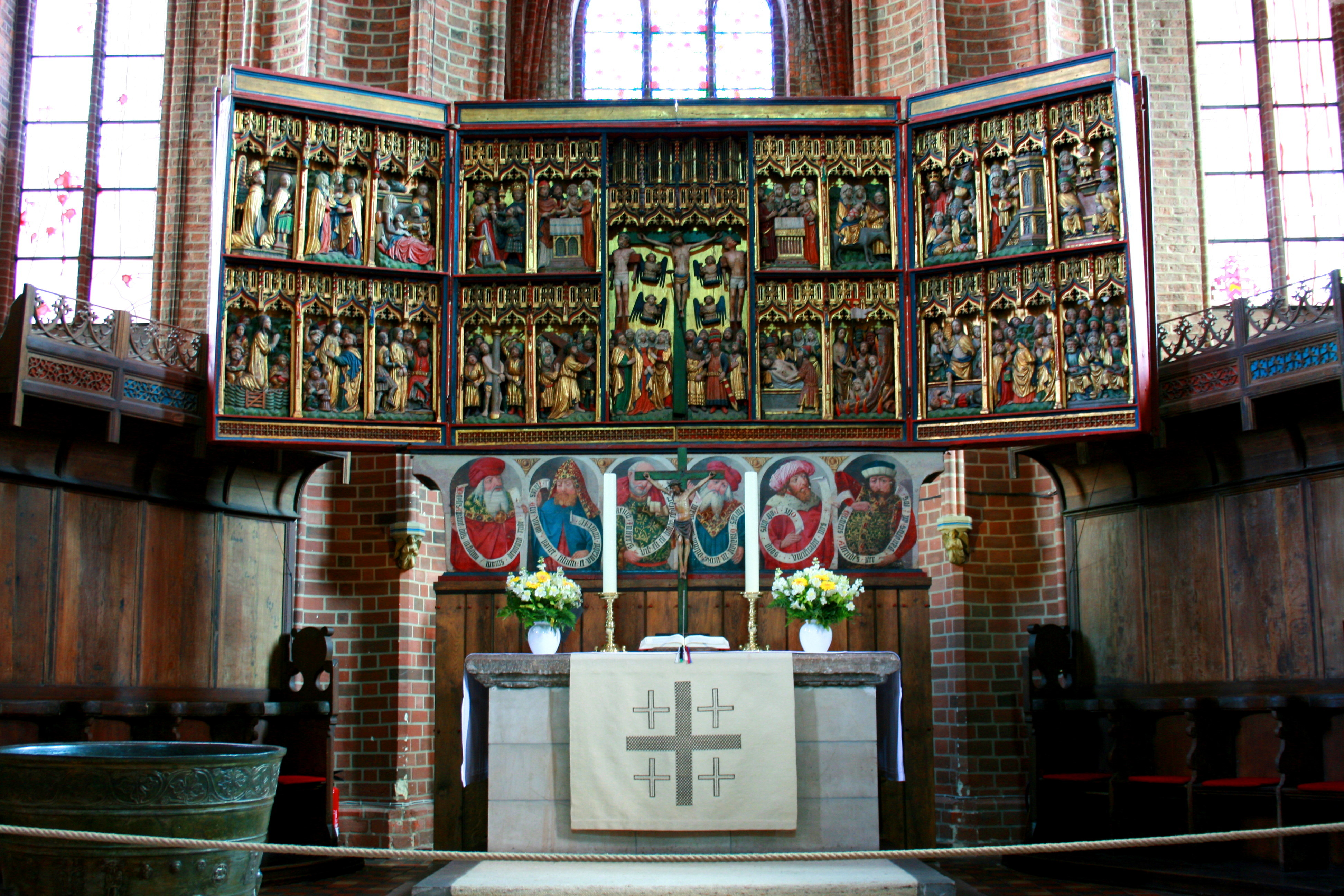 St. Nicolai in Lüneburg